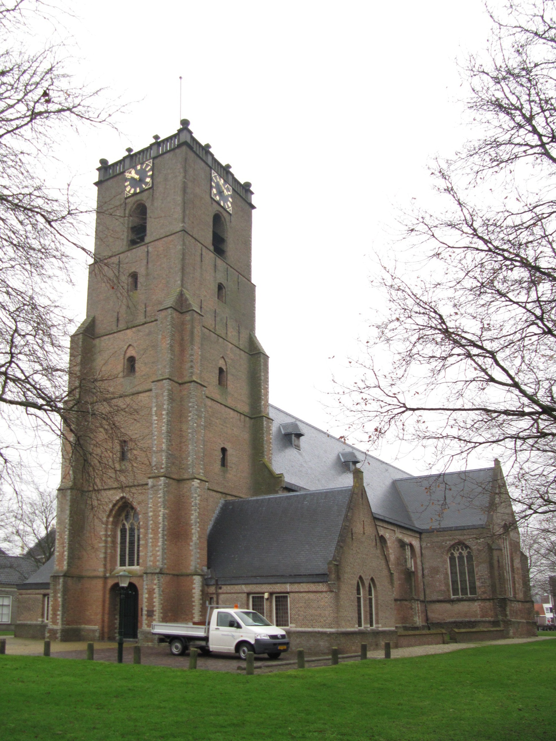 RM29750 Middelharnis - Ring 15 (foto 2).jpg